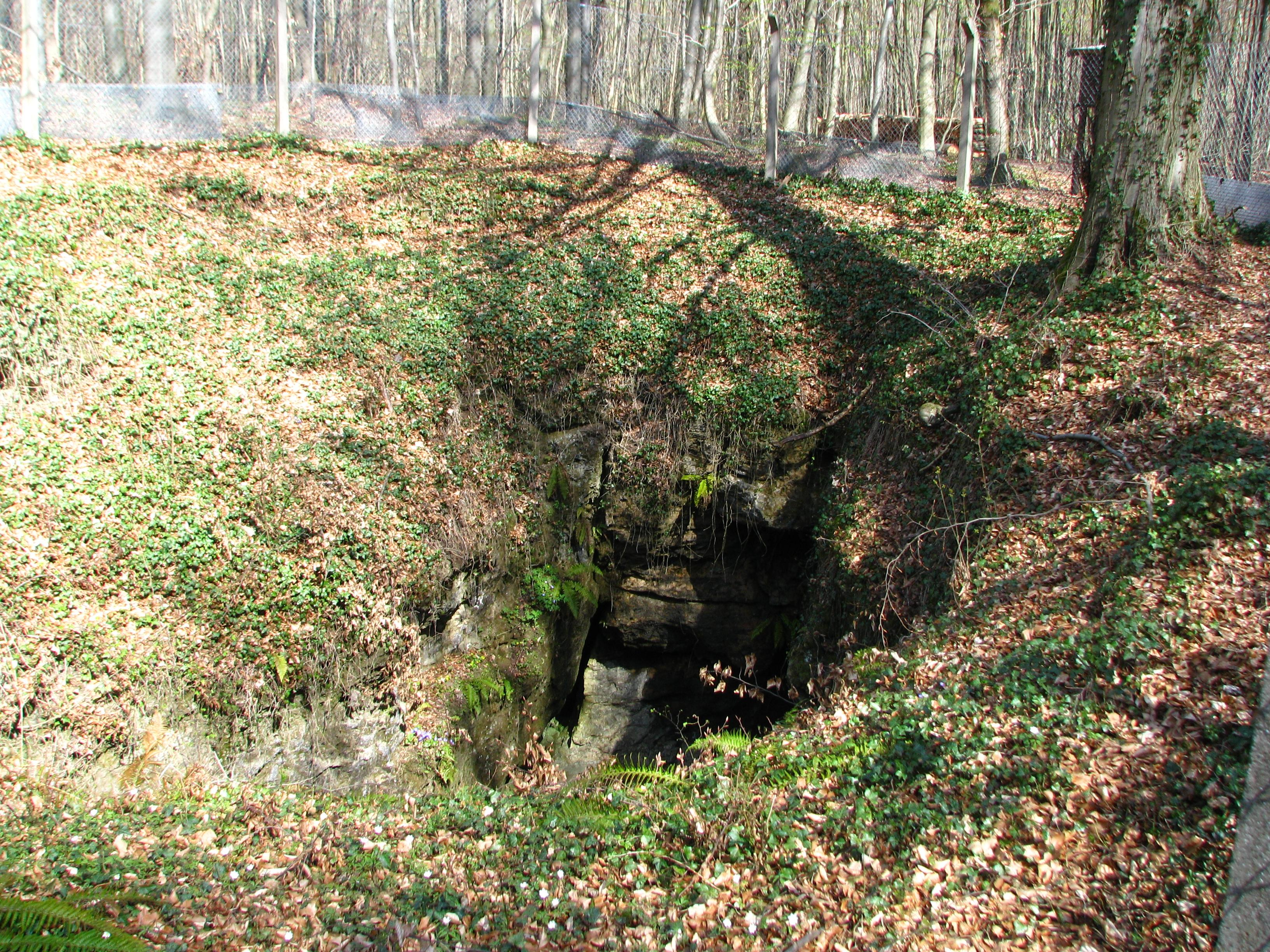 Natureingang der Einhornhöhle bei Scharzfeld.